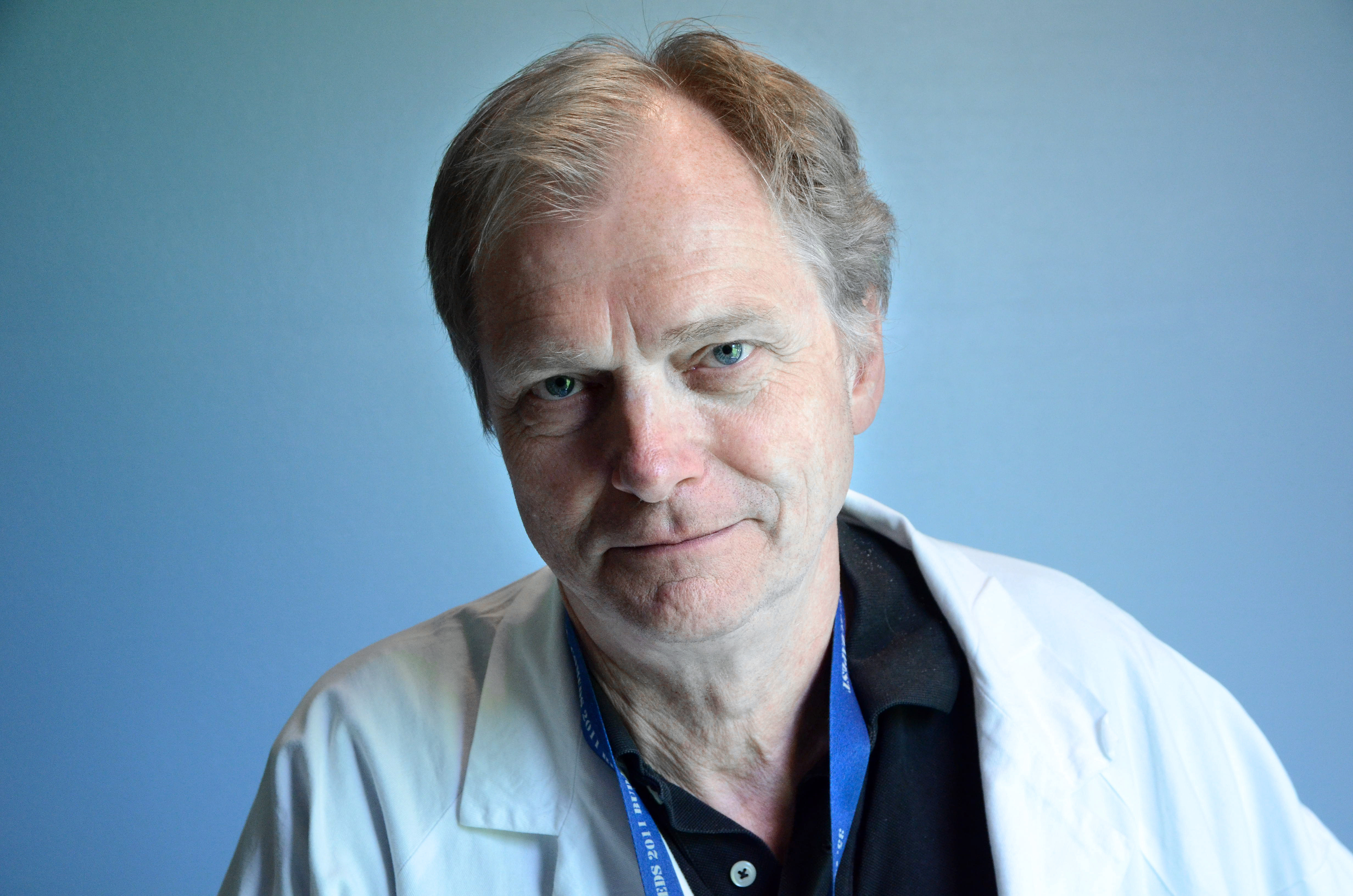 Erik Fosse, overlege ved Oslo universitetssykehus og professor II UiO. Leder for Intervensjonssenteret, Oslo univ. sykehus. Foto: Ram Gupta / Oslo universitetssykehus 2014